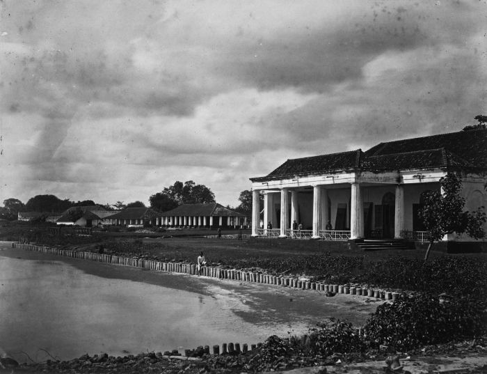 Foto. Sociëteitsgebouw te Rembang